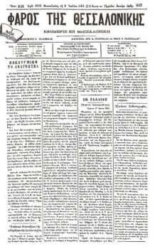 Главата на вестник "Фарос тис Тесалоникис" (1895 - 1912).